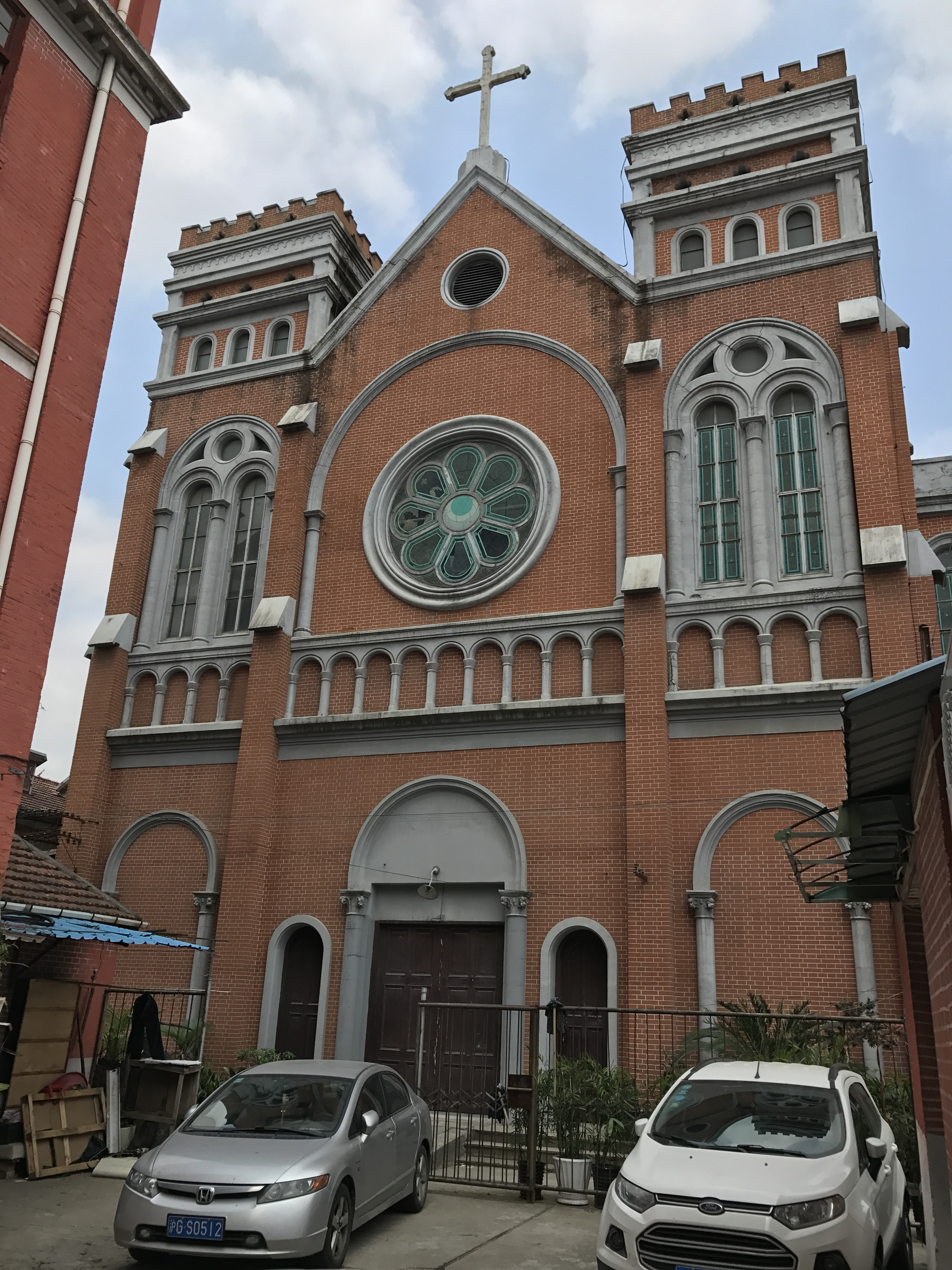 大通路圣女小德肋撒天主堂 大田路370号